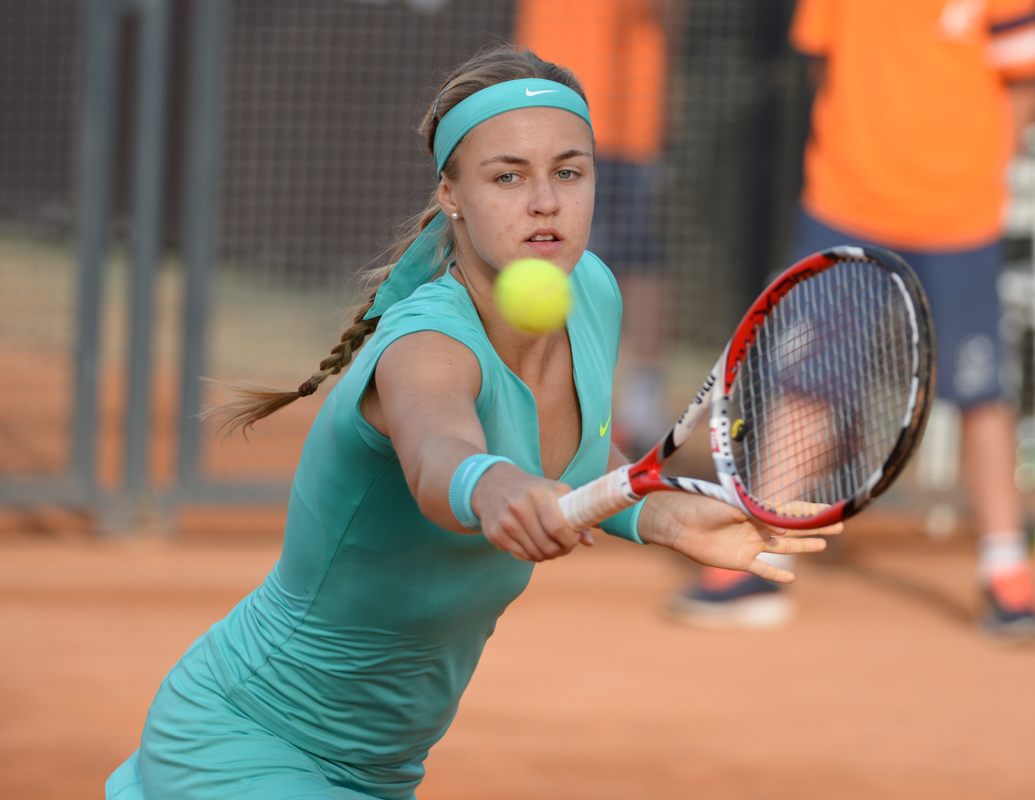 Anna Karolina Schmiedlova